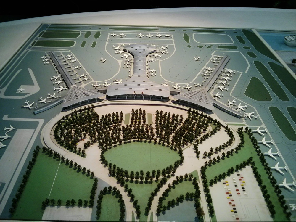 天津滨海国际机场模型